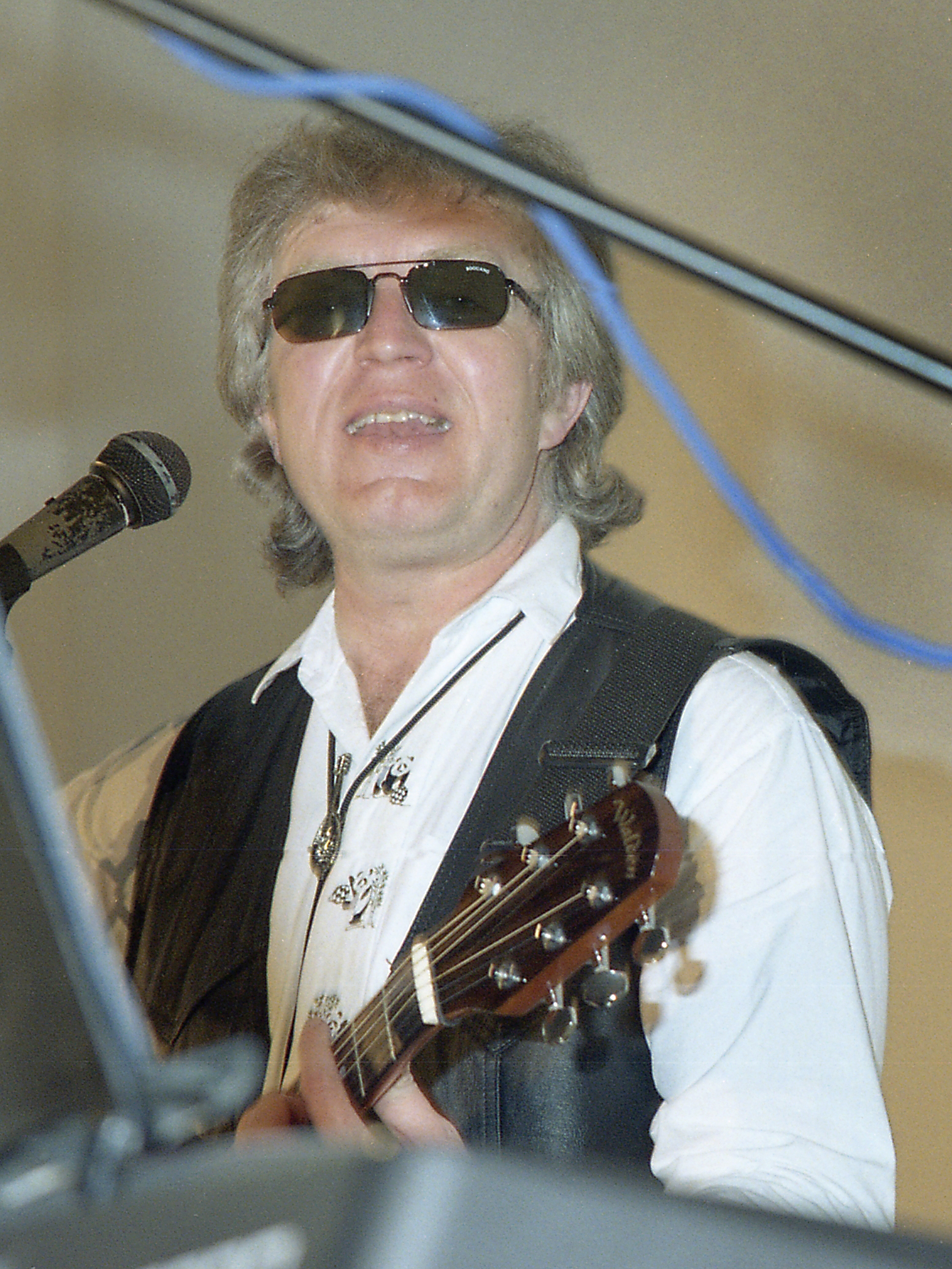 Uno Kaupmees eesti laulja 2001